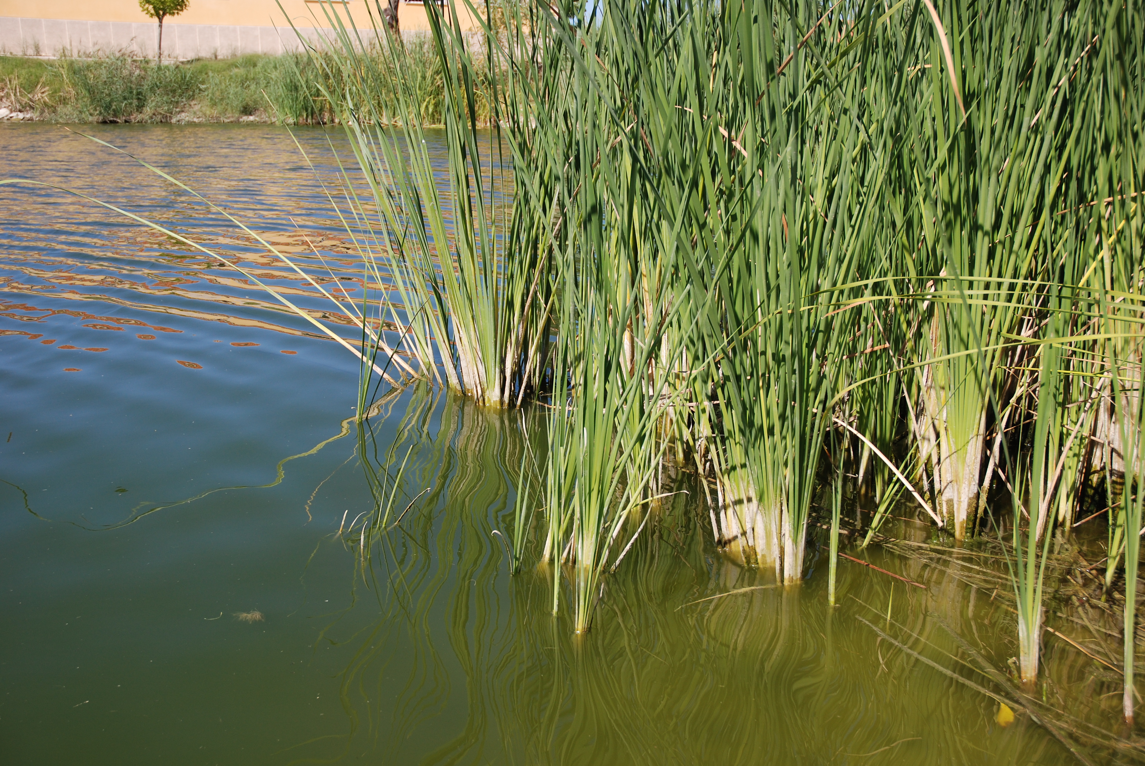 Plantas de enea en Arrocampo